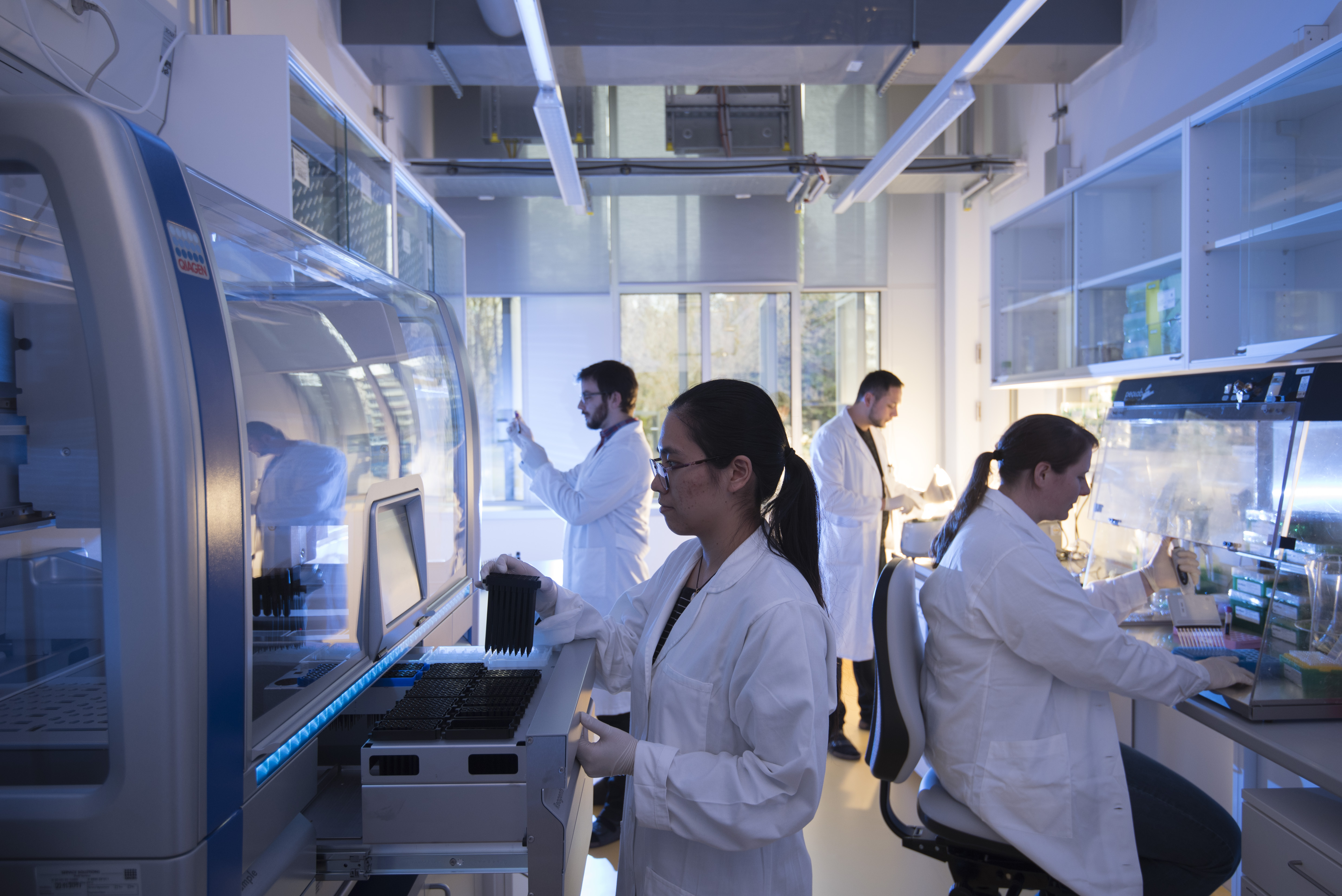 Forschung an der Med Uni Graz